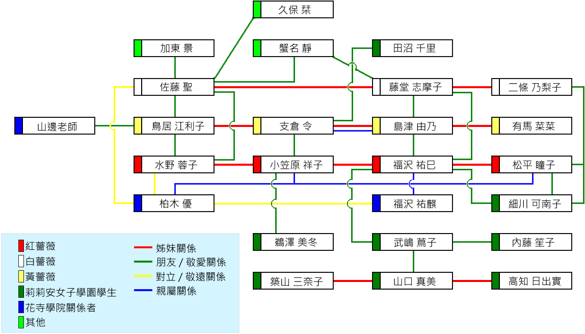 瑪莉亞的凝望人物關係圖（中文版）